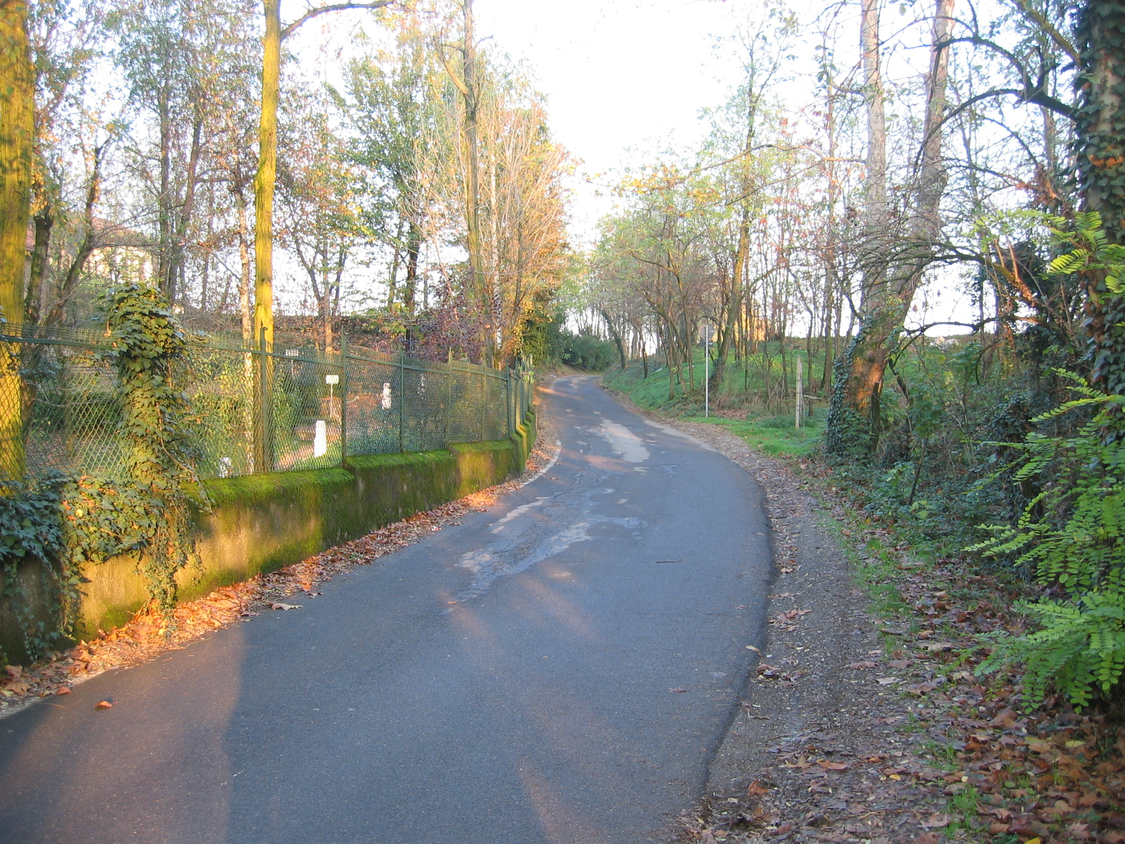 Discesa vicino al Roccolo tipica della Gera d'Adda